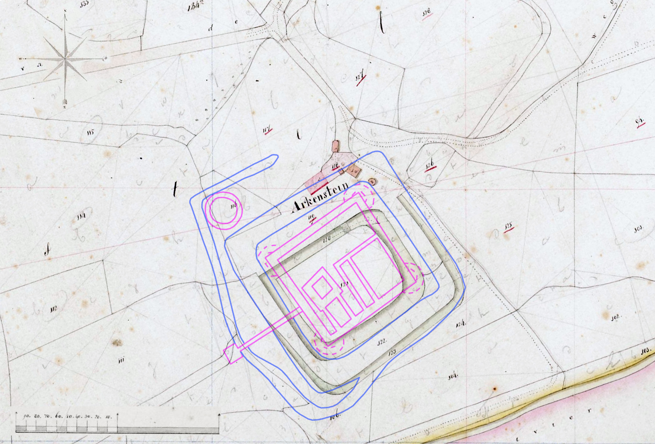 Op de topografische kaart van Bathmen uit 1832 zijn de contouren van het fundament van het kasteel Arkestein zoals vastgesteld door Ground Tracer ingetekend. (Blauw: waterwerk, magenta: constructies) De outlines of the foundation of Castle Arkestein are drawn on a 1832 topographical map of Bathmen